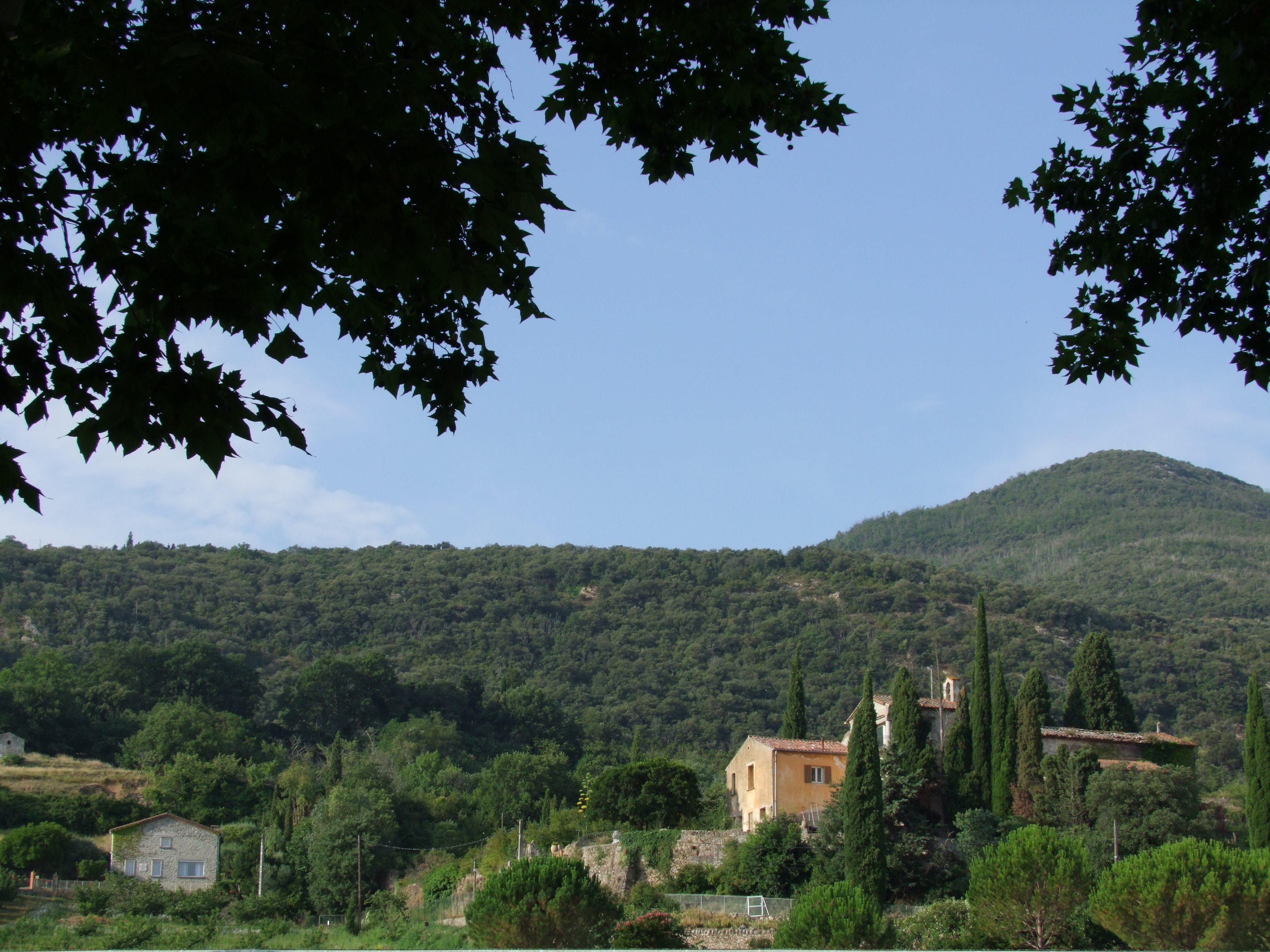 Maison-atelier du peintre Pinchus Krémègne,à gauche,proche de l'ancien couvent des capucins à Céret,à droite.Etat actuel (Réhaussée en 1988 par ses nouveaux propriétaires).L'artiste peintre y vécut de 1960 à 1981,année de sa mort.De nombreuses toiles représentent ses abords et l'intérieur de son atelier,réalisées dans les dernières années de sa vie,dont certaines visibles au Musée d'Art Moderne de Céret.Vue depuis l'avenue d'Espagne,qu'il avait déjà immortalisé dès 1918.En 1945,il acquit un terrain dans ce site pour y faire construire cette maison 15 ans plus tard.